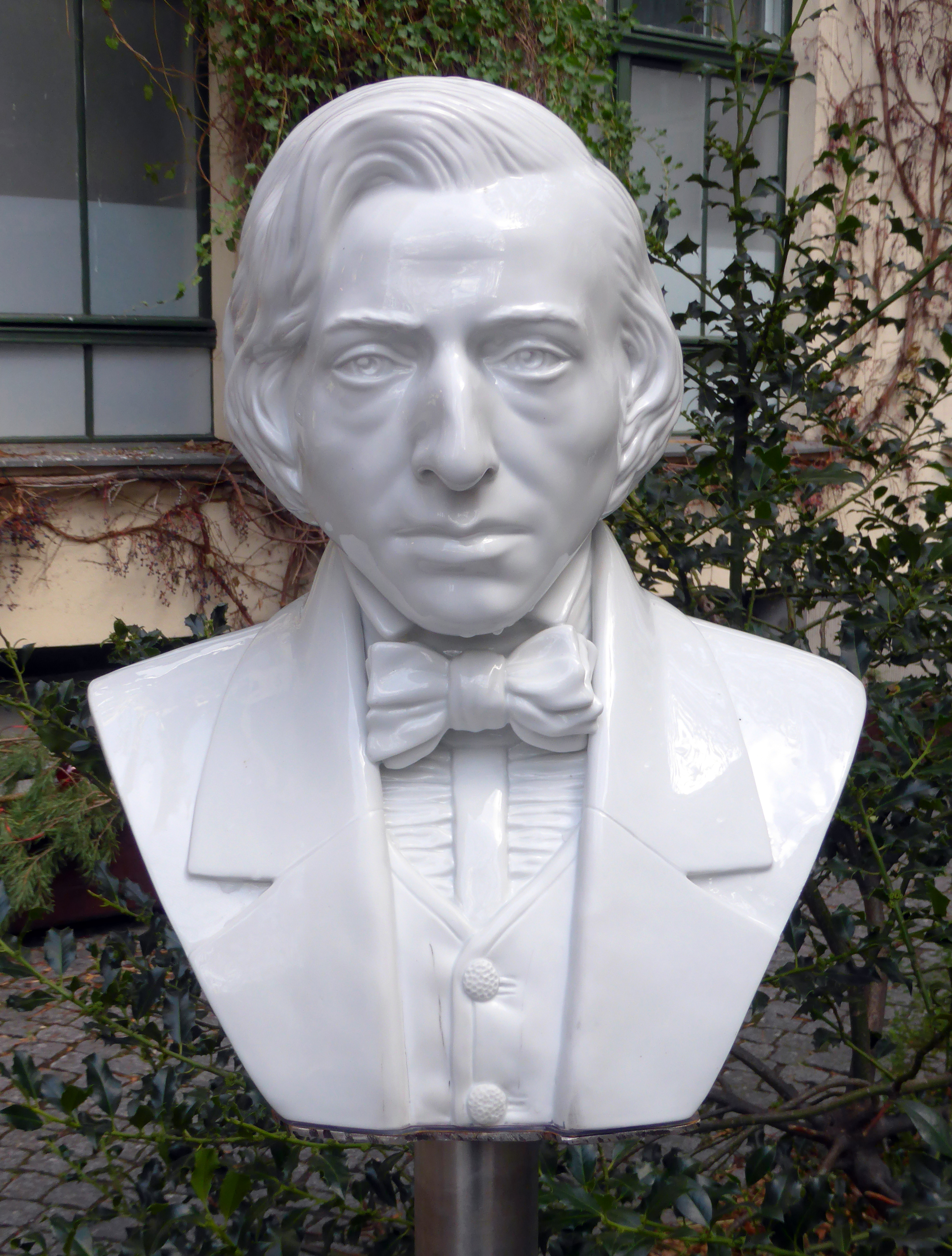 Frédéric Chopin-Büste (Biskuit-Porzellan) von KPM, Berlin Hackesche Höfe. Entwurf Christian Bahr. Büste Lebensgroß, Limitiert 99 Stück.